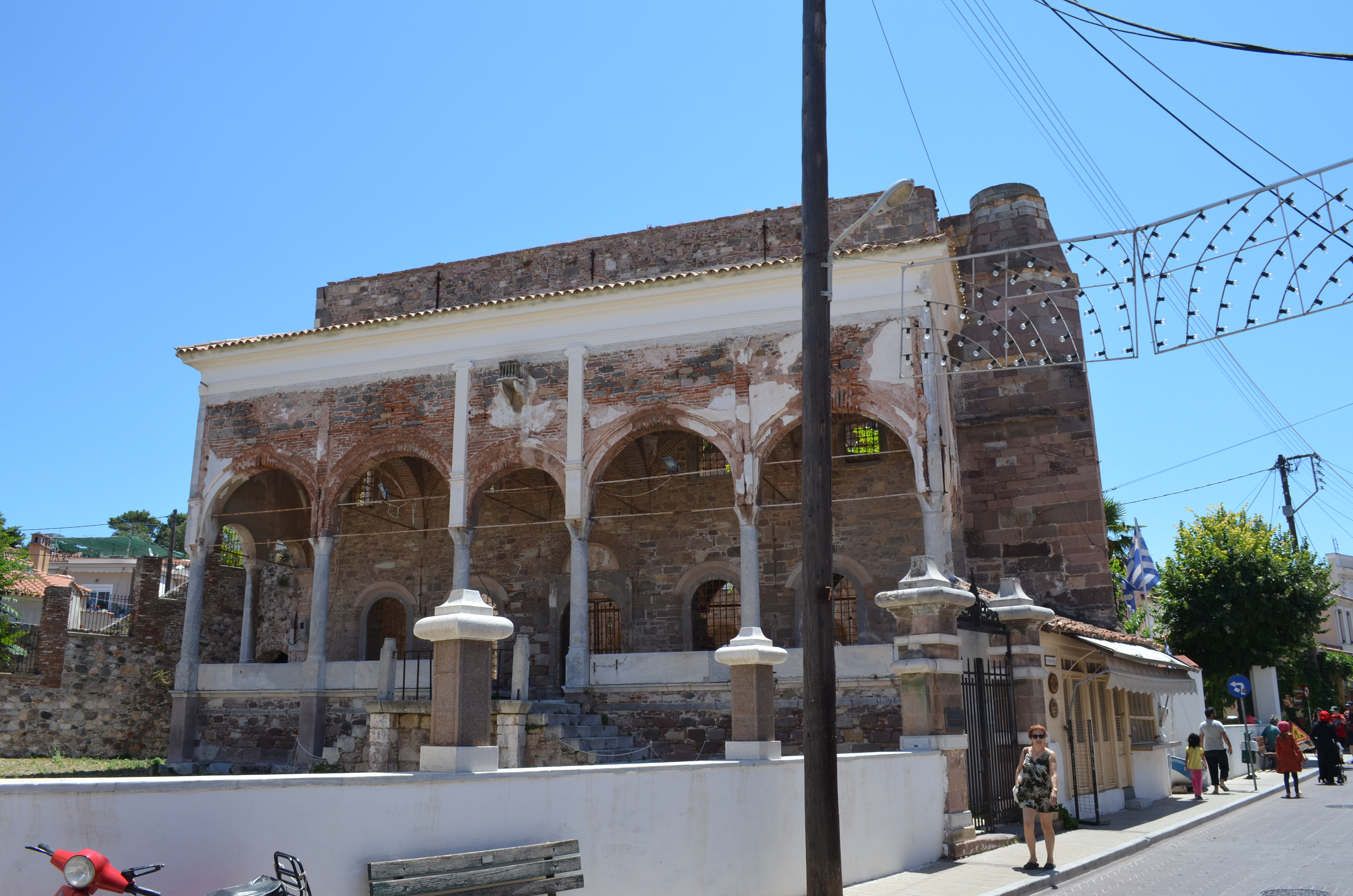 Die Yeni Cami auf Lesbos